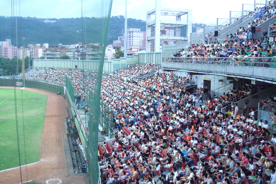 天母棒球場（2008/07/26 興農牛 - 統一7-ELEVEn獅）